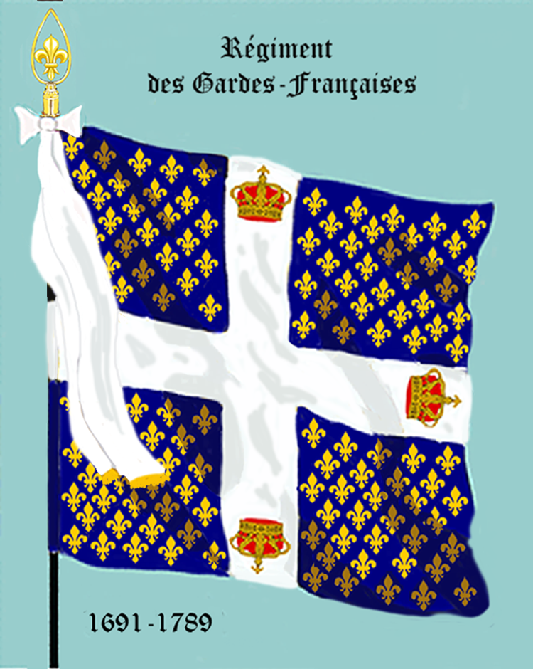 Ordonnanzfahne eines königlich französischen Infanterie-Regiments “Gardes-Françaises” von 1691-1789. - LES DRAPEAUX DE L'ARMÉE DU ROI“ Marseille 1899. (Drapeau d'ordonnance d' un régiment française d'infanterie royale.)